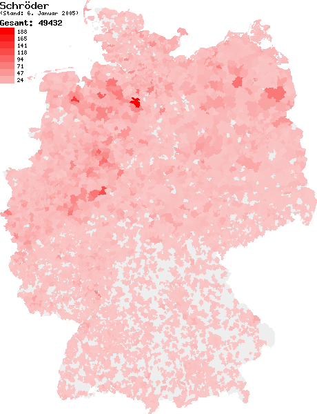 Verteilung des Nachnamens Schröder in Deutschland nach dem Telefonbuch mit Stand vom 6. Januar 2005 Source: selbst erstellt Ersteller: W. Baumgartner